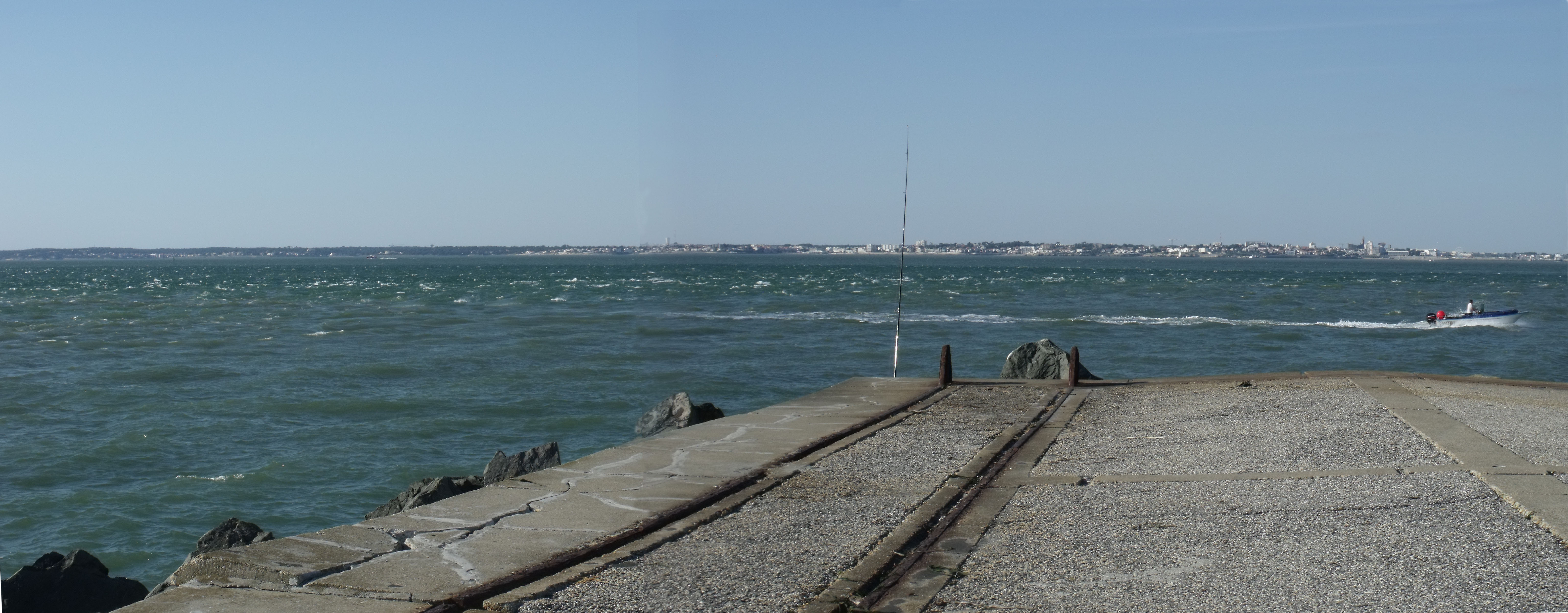 Altes Streckenende Bahnstrecke Bordeaux-St-Louis–Pointe de Grave an der Mole